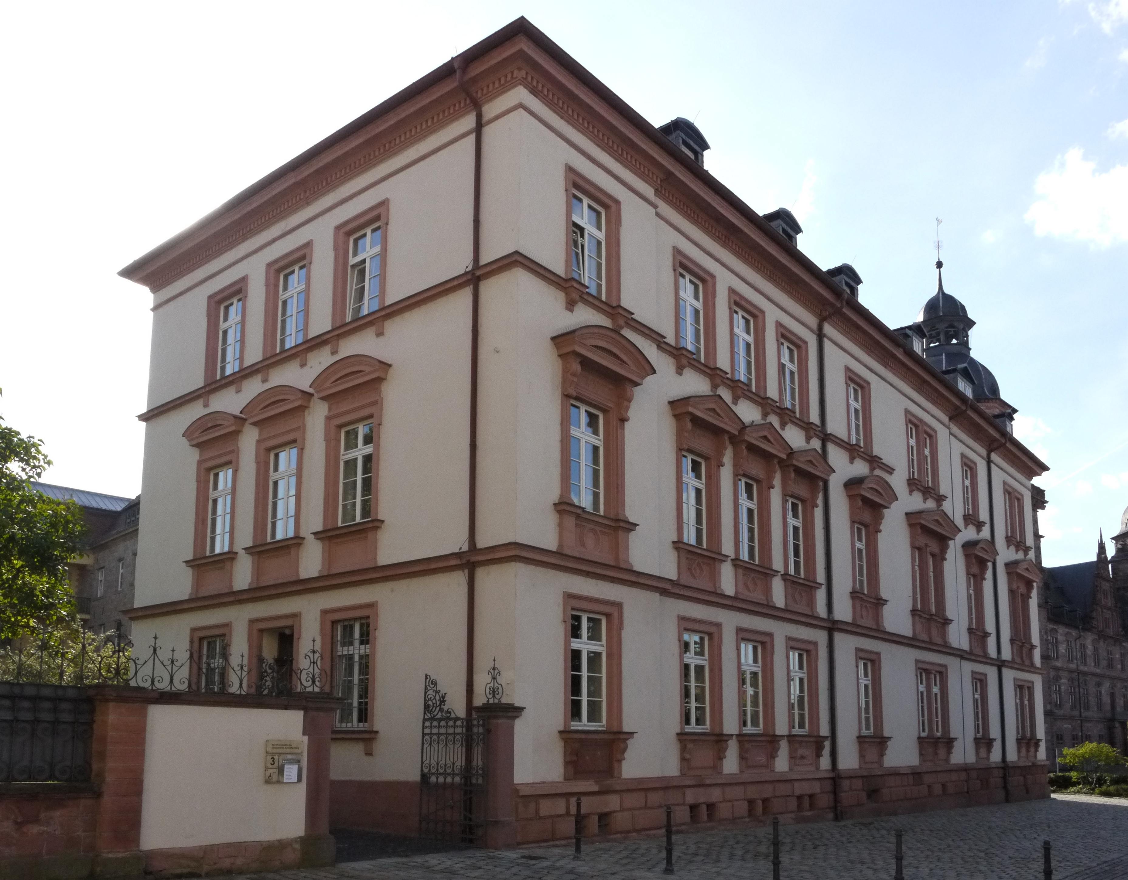 Schlossplatz 5 (Jesuiten-Niederlassung) heute Justizgebäude in Aschaffenburg (denkmalgeschützt)